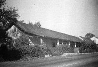 Depicted place: El Adobe de Capistrano